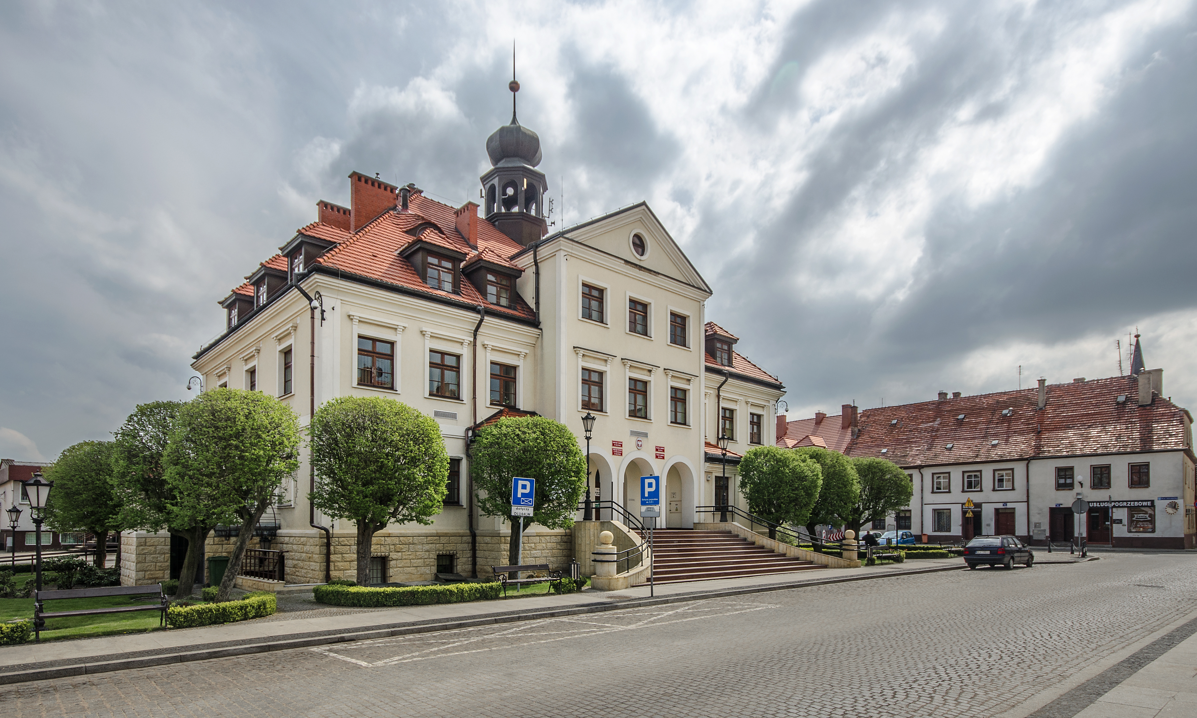 Rudna, woj. dolnośląskie, gm. Lubin - ratusz